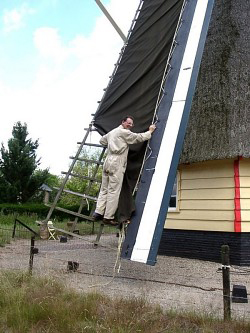 Foto: Hans de Kroon Zie ook overleg.